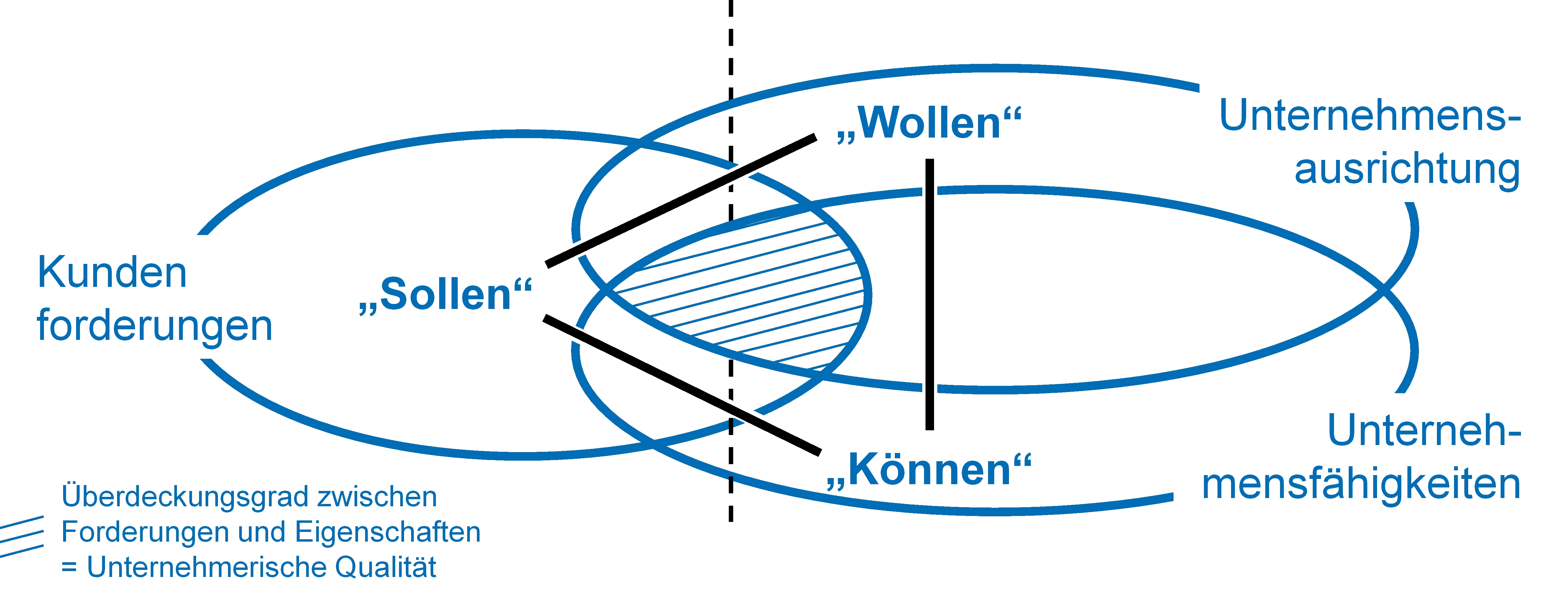 Der Überdeckungsgrad aus Kundenforderungen, Unternehmensausrichtung und Unternehmensfähigkeiten stellt die unternehmerische Qualität dar.